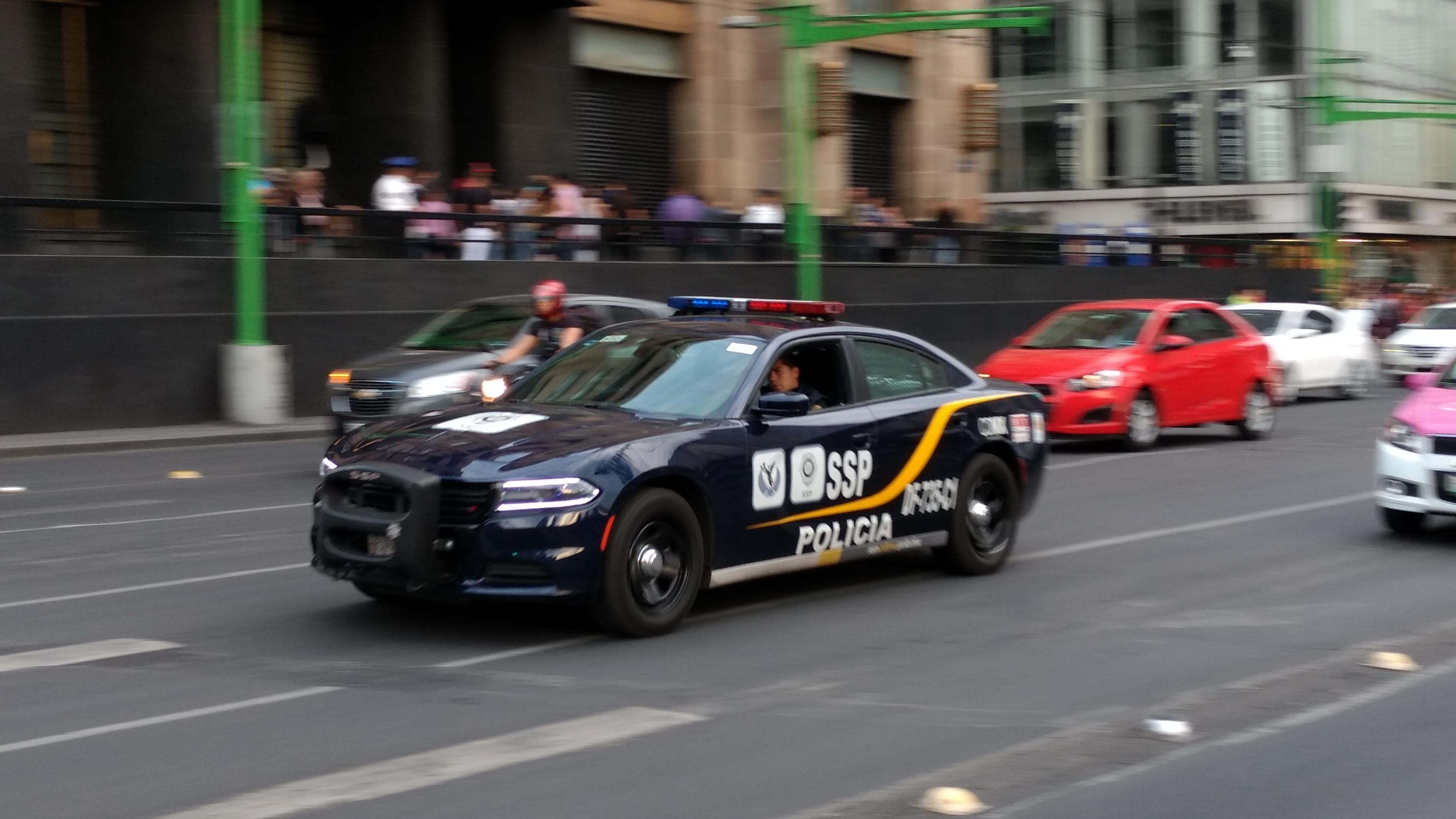 A 2015 Dodge Charger of the Mexico City Police driving through Eje Central Avenue, downtown Mexico City.